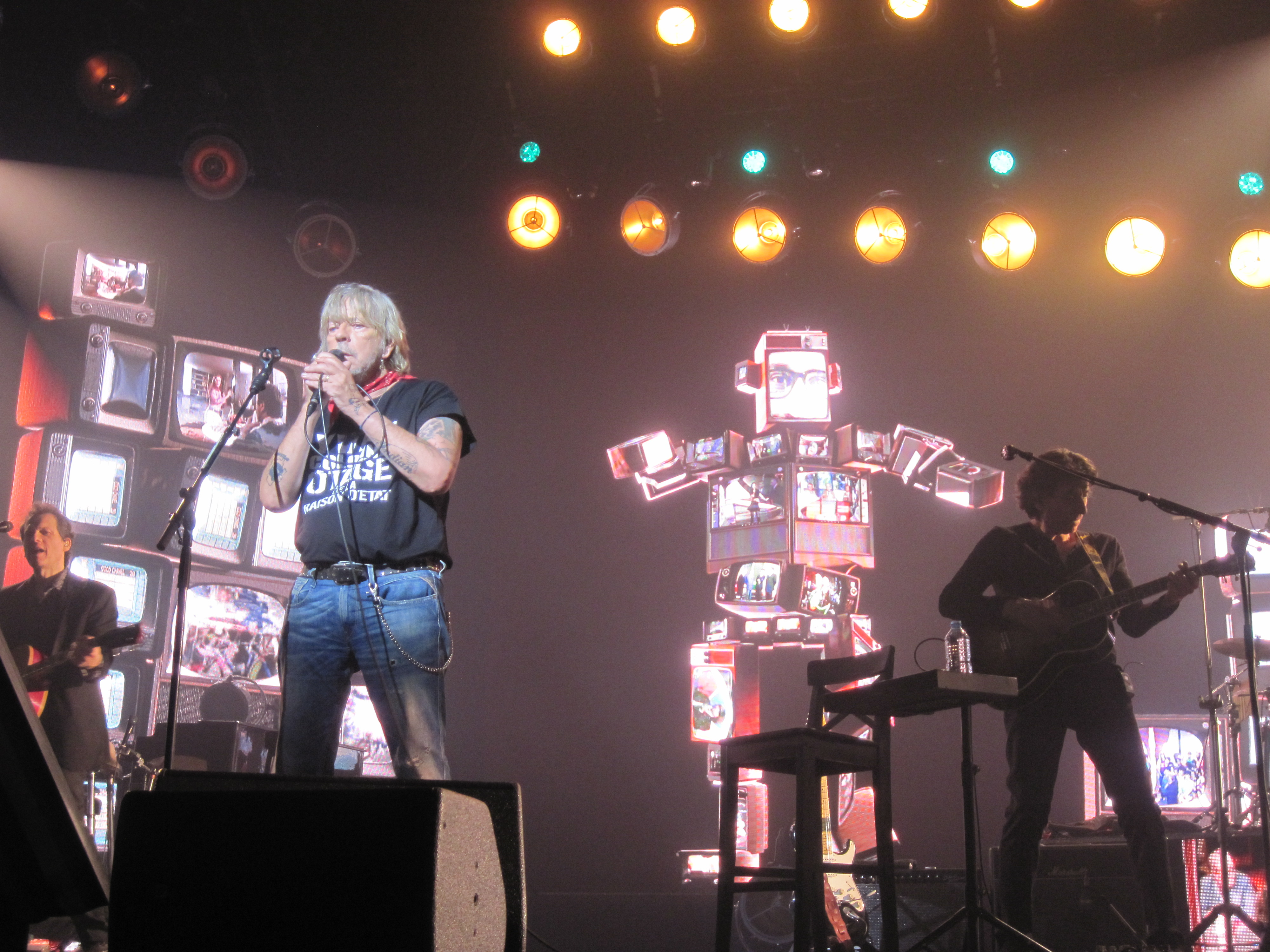 Renaud en concert au Zénith de Paris.